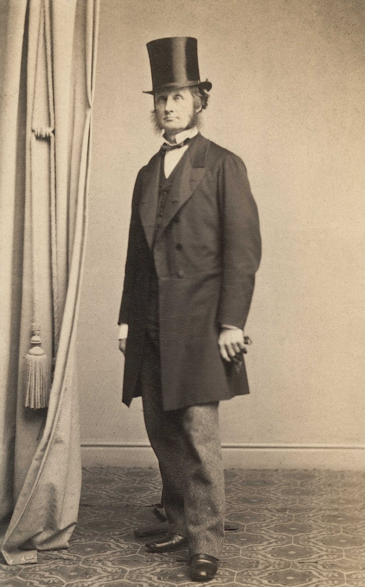 Thorvald Meyer, portrett, mann, godseier, flosshatt, helfigur, visittpositur.